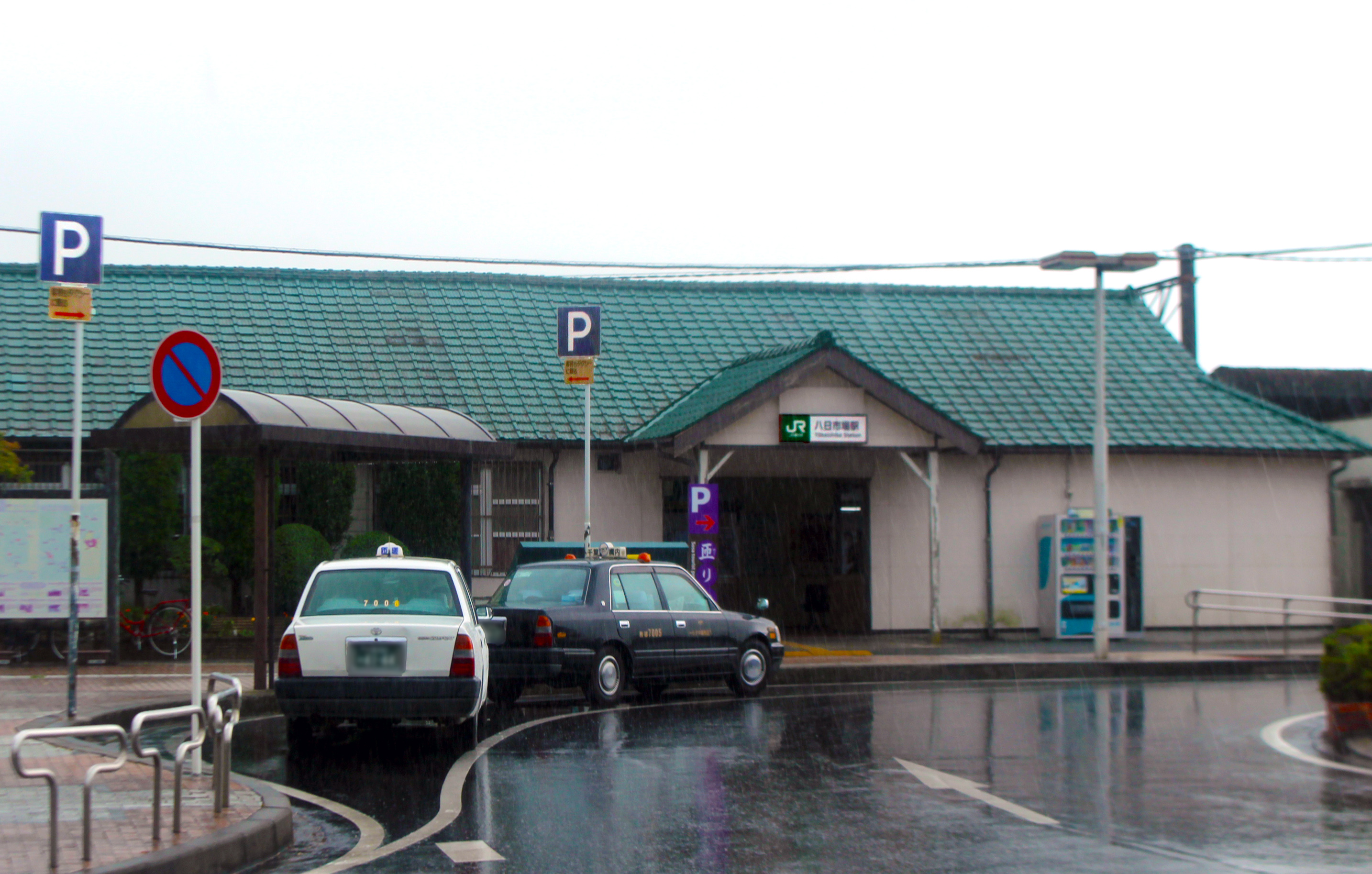 Yōkaichiba Station